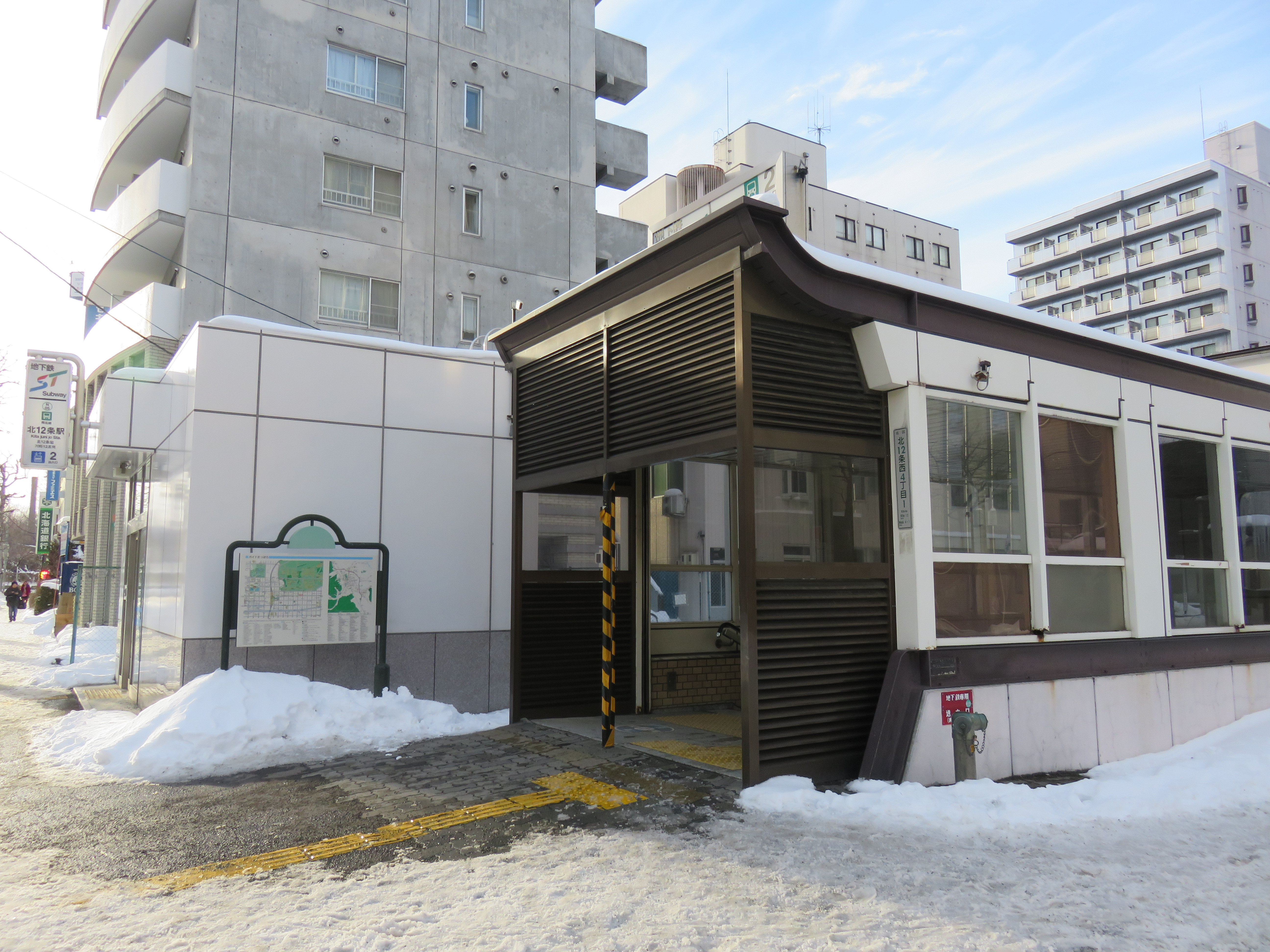 北12条駅2番出入口